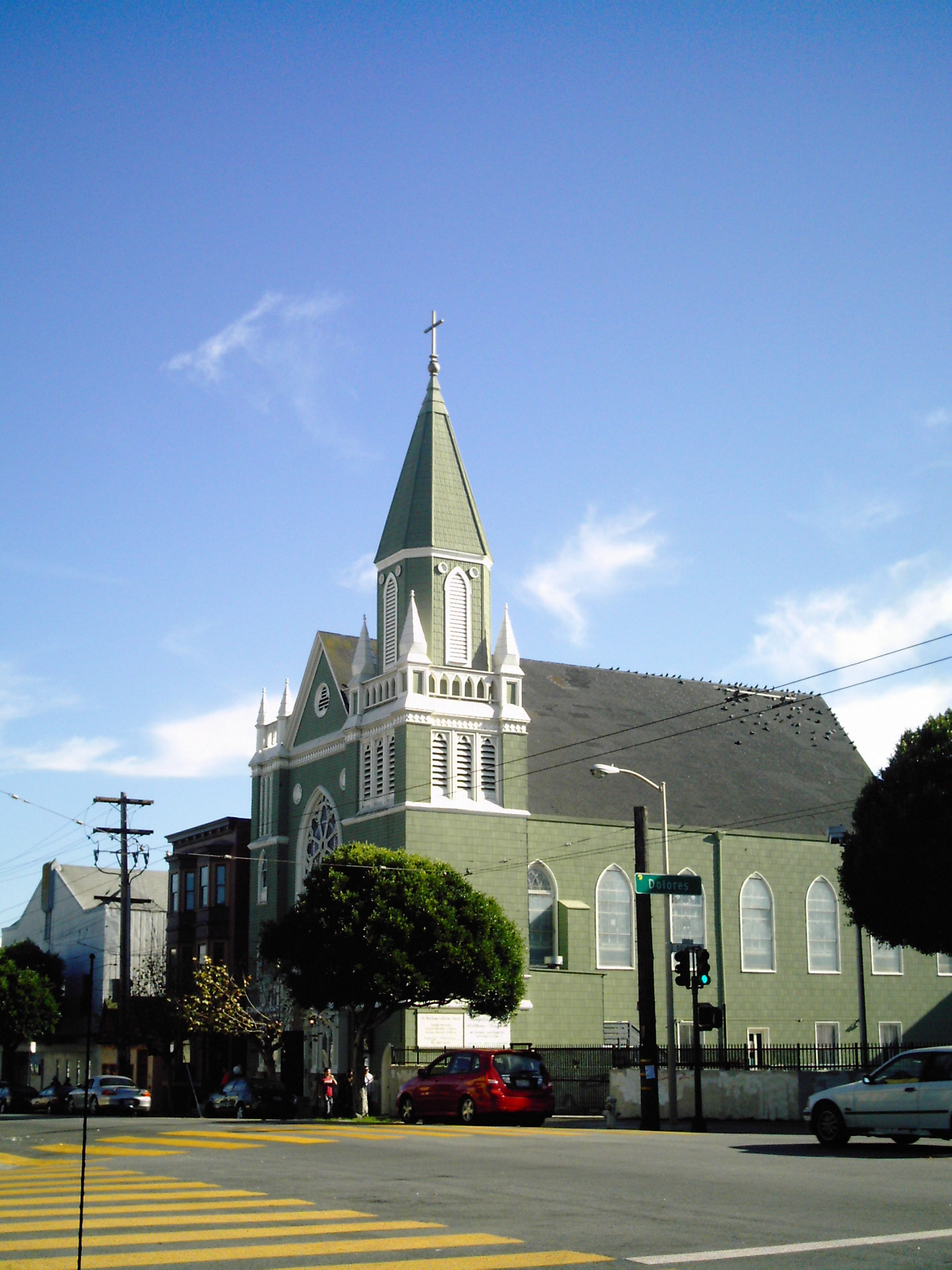 St. Matthäus-Kirche zu San Francisco, gesehen von der Ecke 16th Street und Dolores Street.